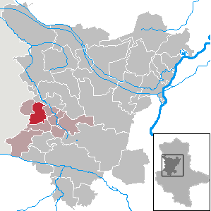 Sommersdorf in Saxony-Anhalt (Country) - District (Landkreis) Börde